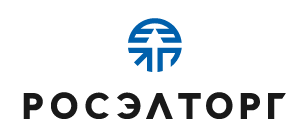 Логотип компании